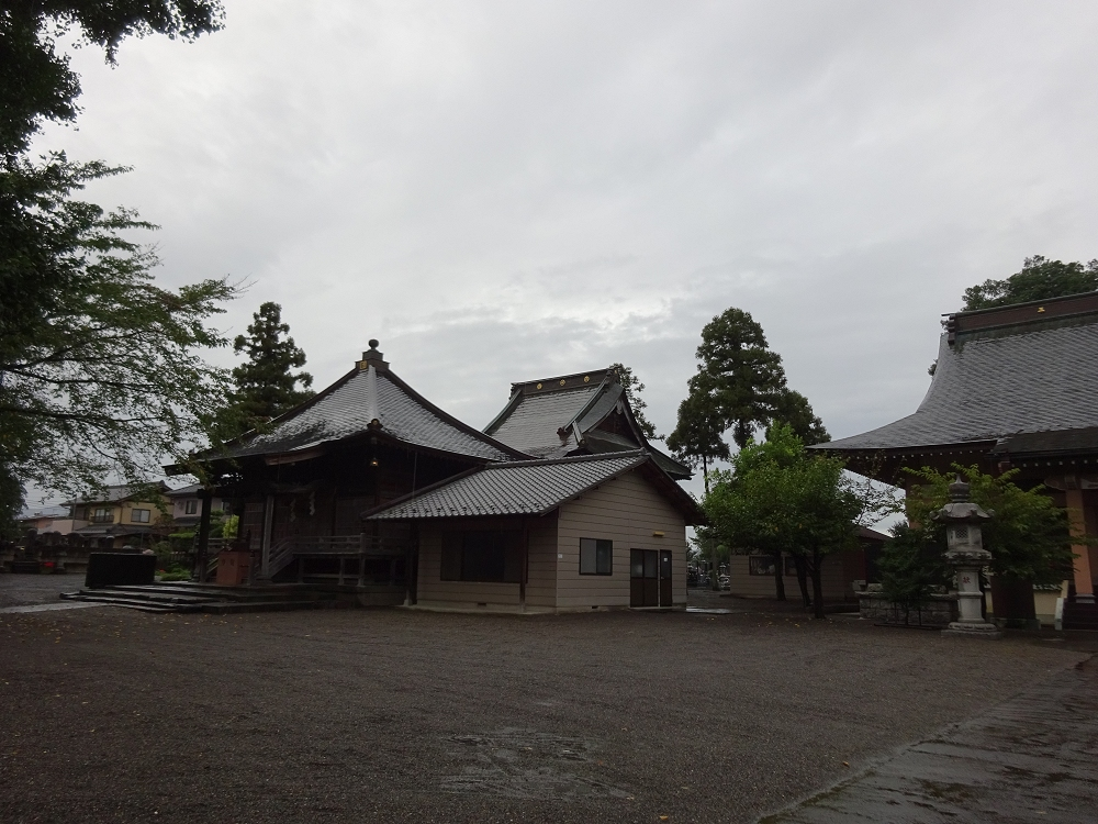 高崎の妙見寺